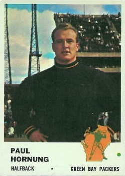 1961 Fleer #90: Paul Hornung